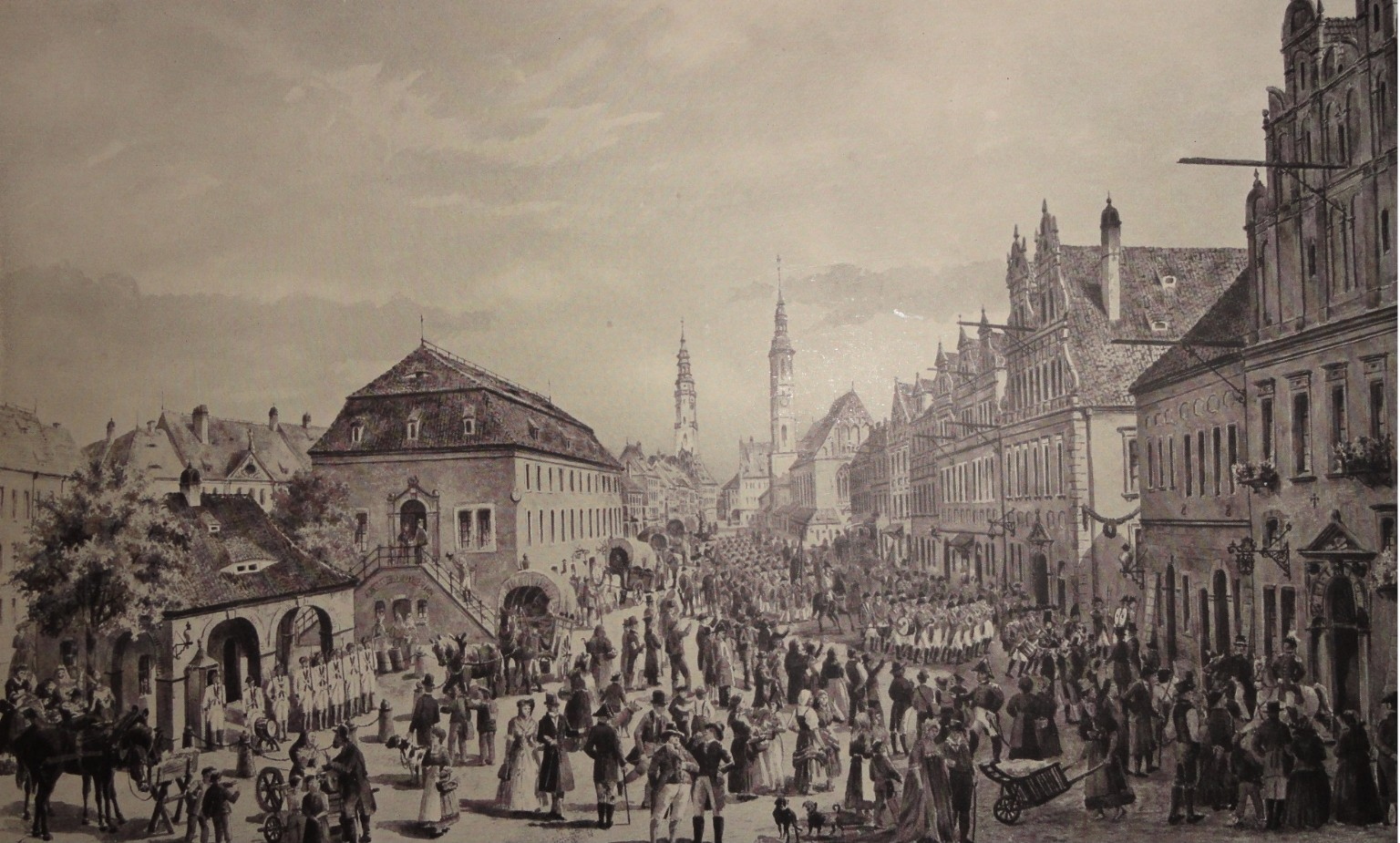 Gemälde des Görlitzer Obermarktes 1792, Ausmarsch der Schützengilde zum Pfingstschießen, in der Mitte steht noch das Salzhaus